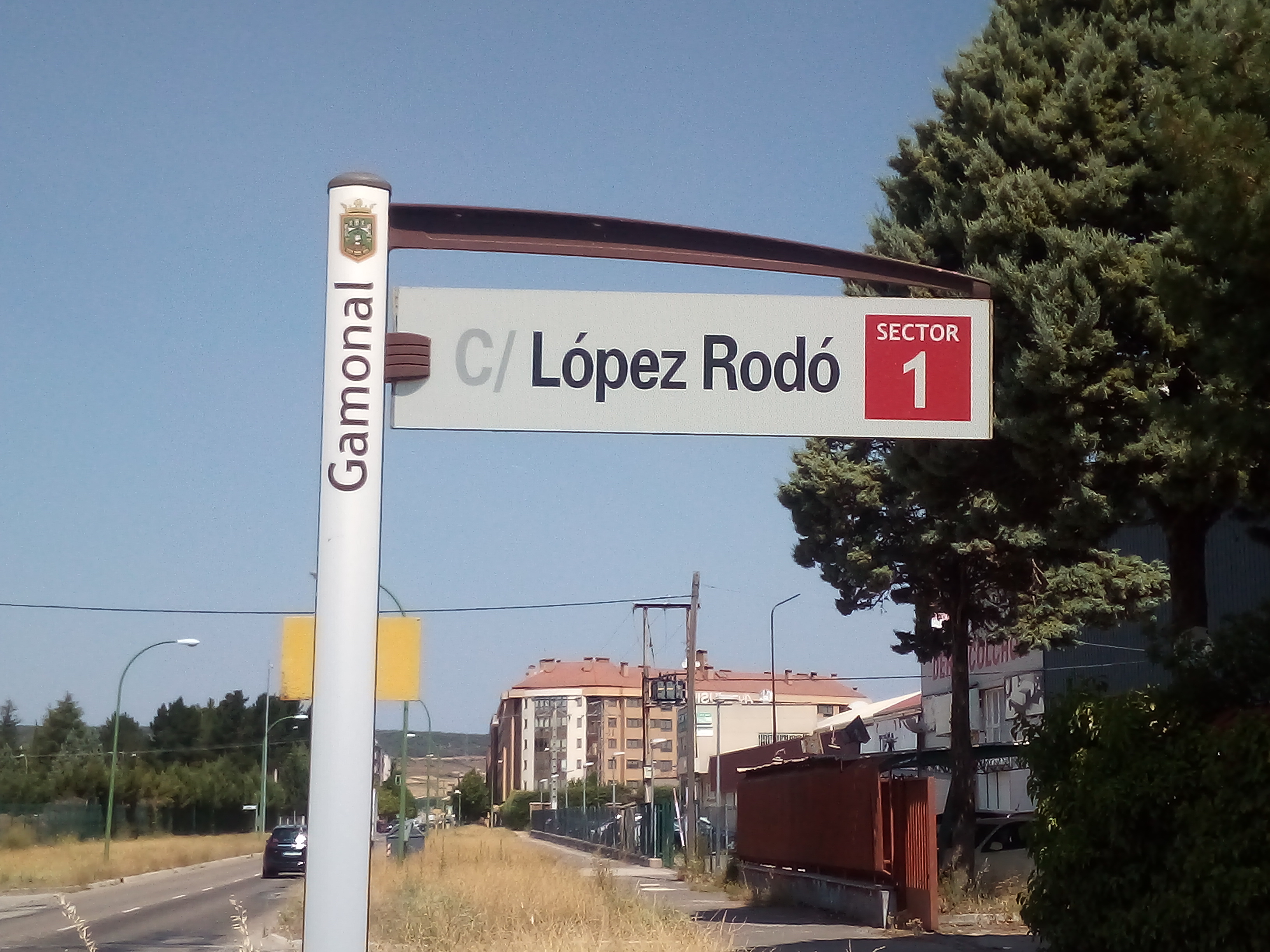 Calle en honor al ministro Laureano López Rodó